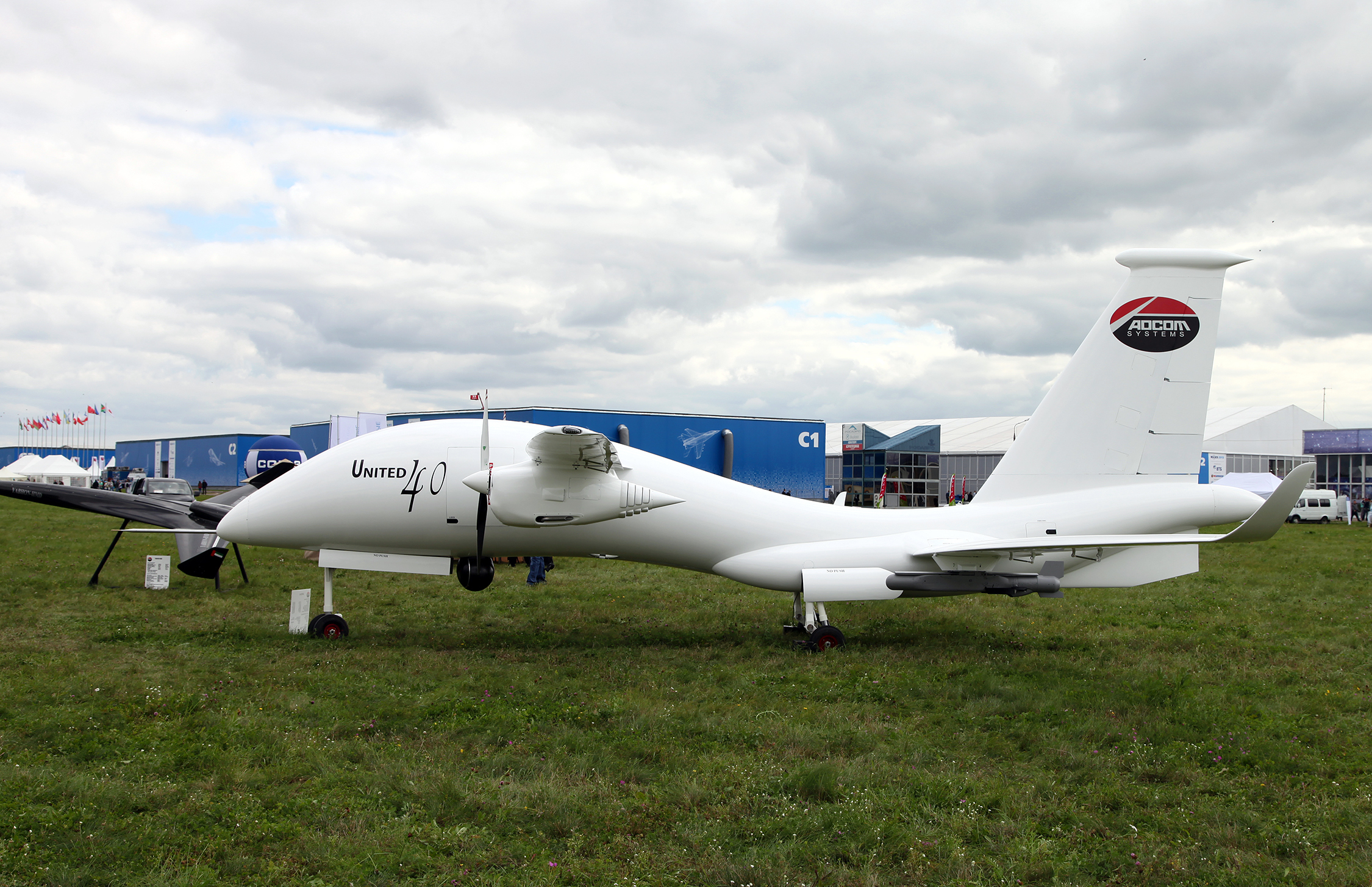 БПЛА United 40 из ОАЭ (United 40 UAV from UAE)